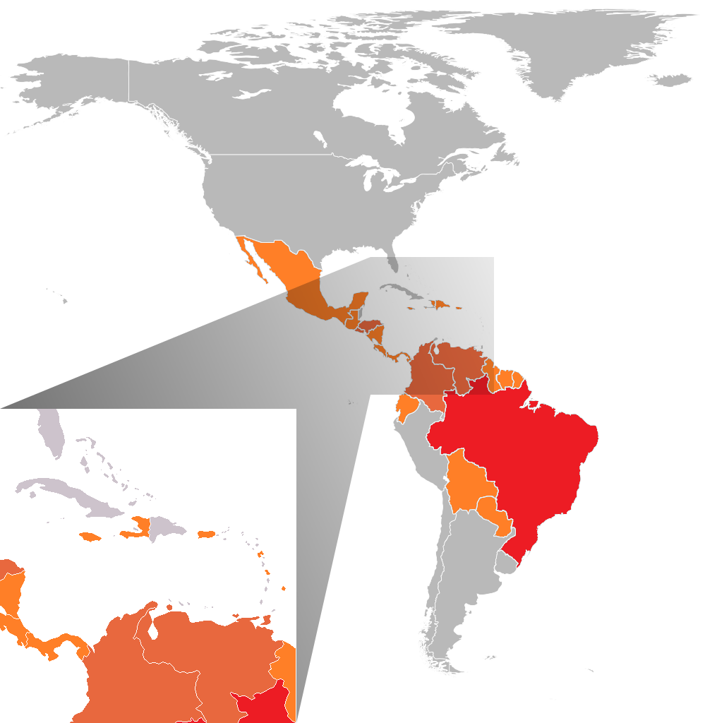 Propagation du virus Zika en Amérique à février 2016. Plus d'un million de cas confirmés. Entre un million et 1500 cas confirmés. Moins de 1500 cas confirmés.